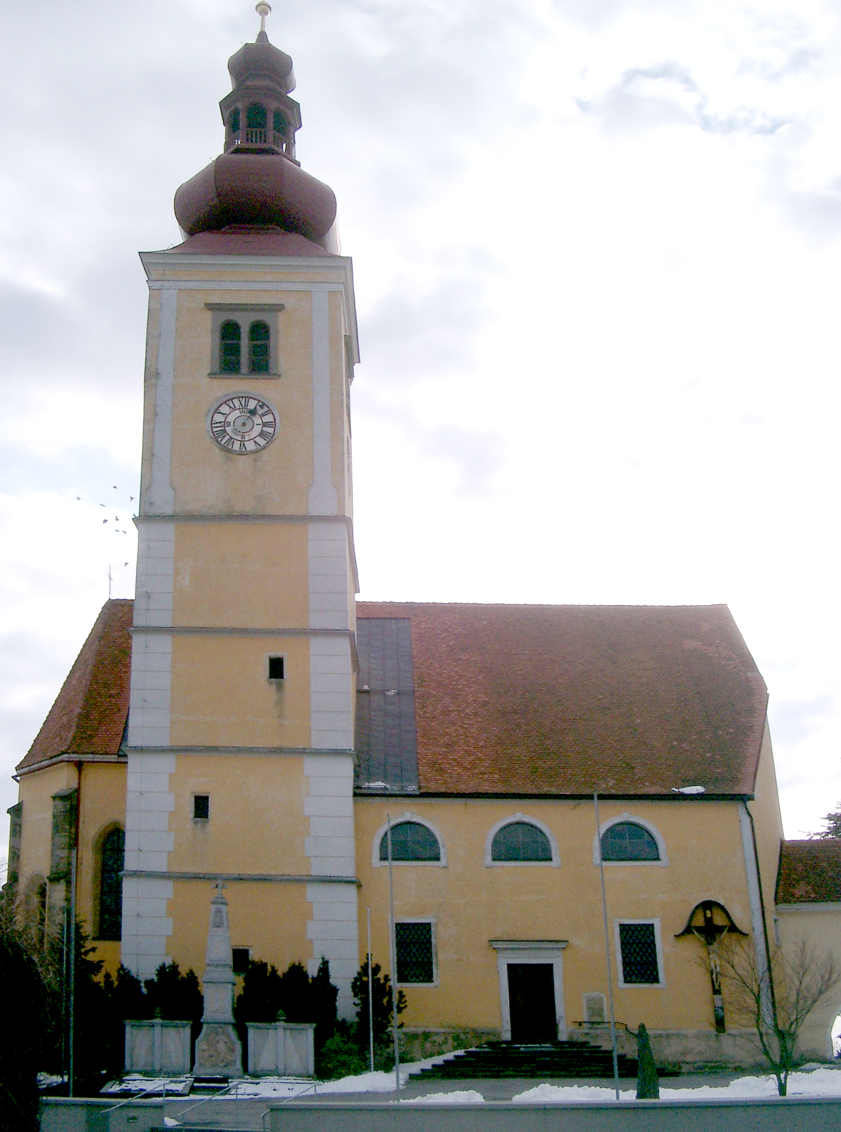 Kath. Pfarrkirche Mariä Himmelfahrt